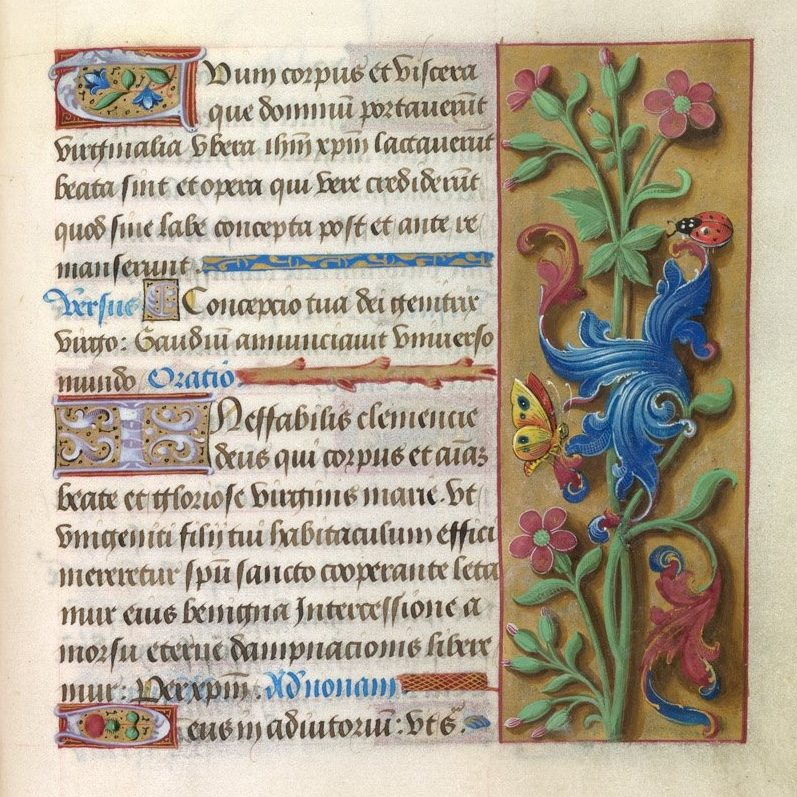 Folio-38-BL British Library